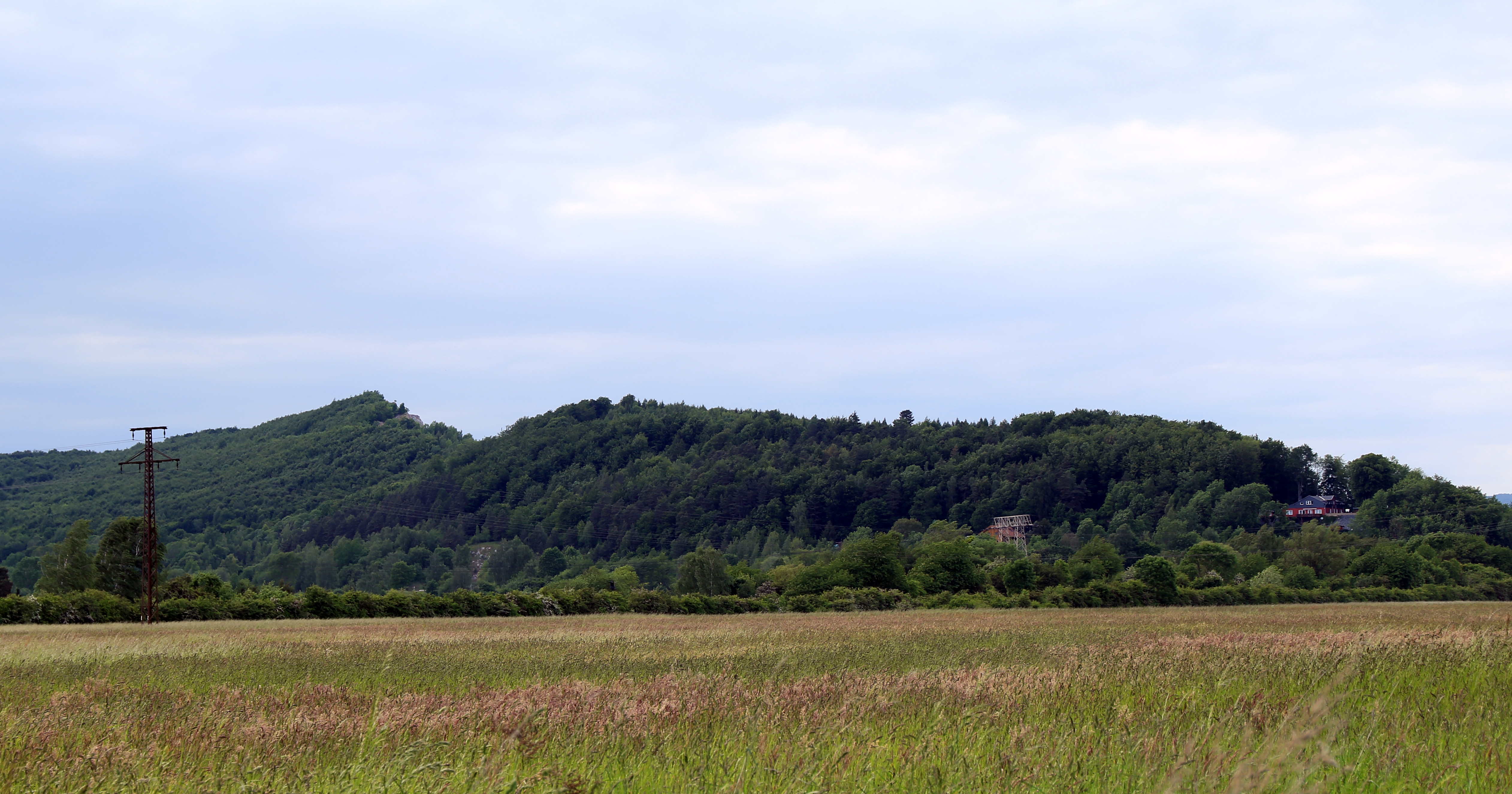 Der Kohnstein bei Nordhausen